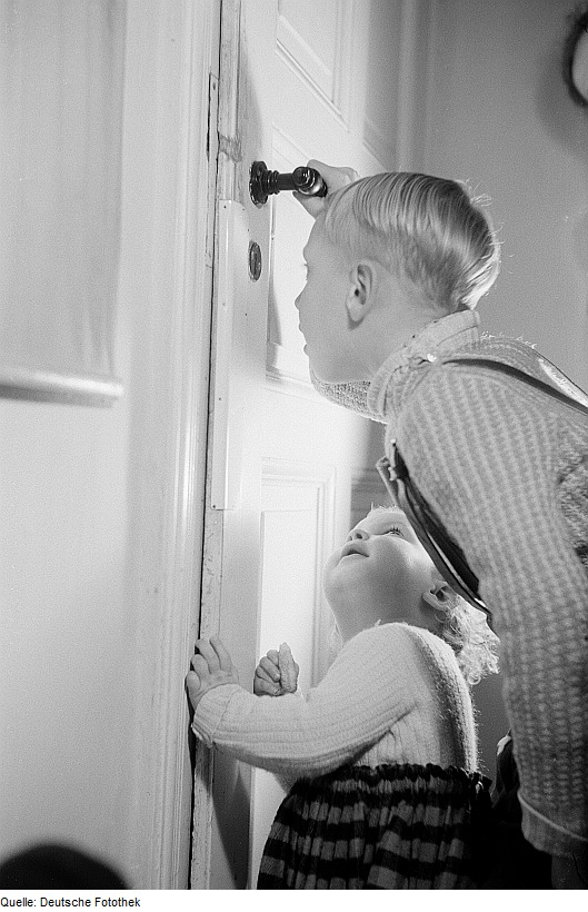 Original image description from the Deutsche Fotothek Ein Kind schaut durch ein Türschlüsselloch und ein Kleinkind schaut zu ihm auf, im Hintergrund eine Frau